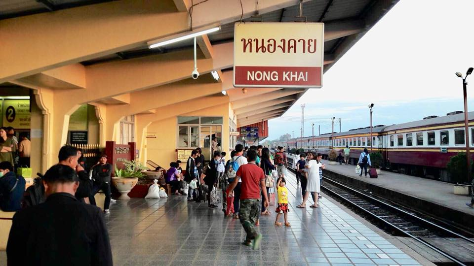 ชานชลาสถานี